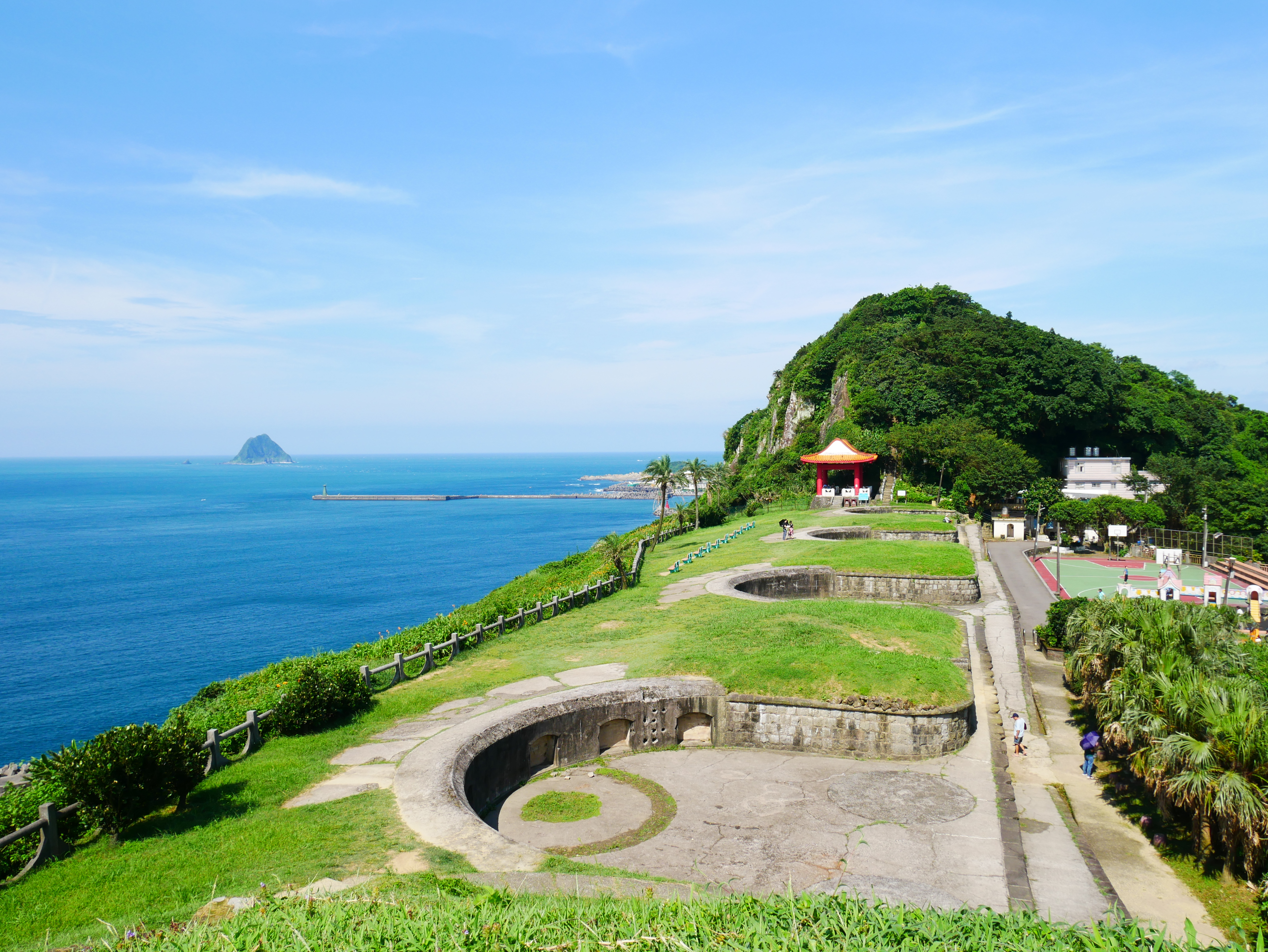 中文（台灣）: 白米甕砲台遠景，基隆市中山區太白里